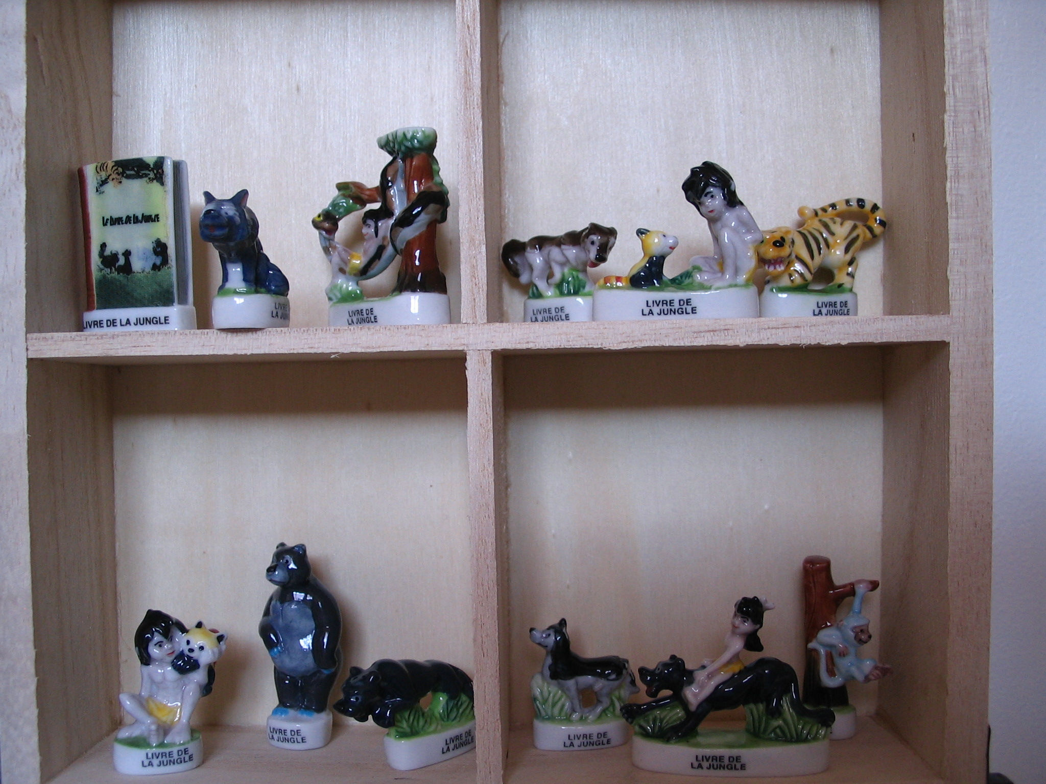 série féve du livre de la jungle